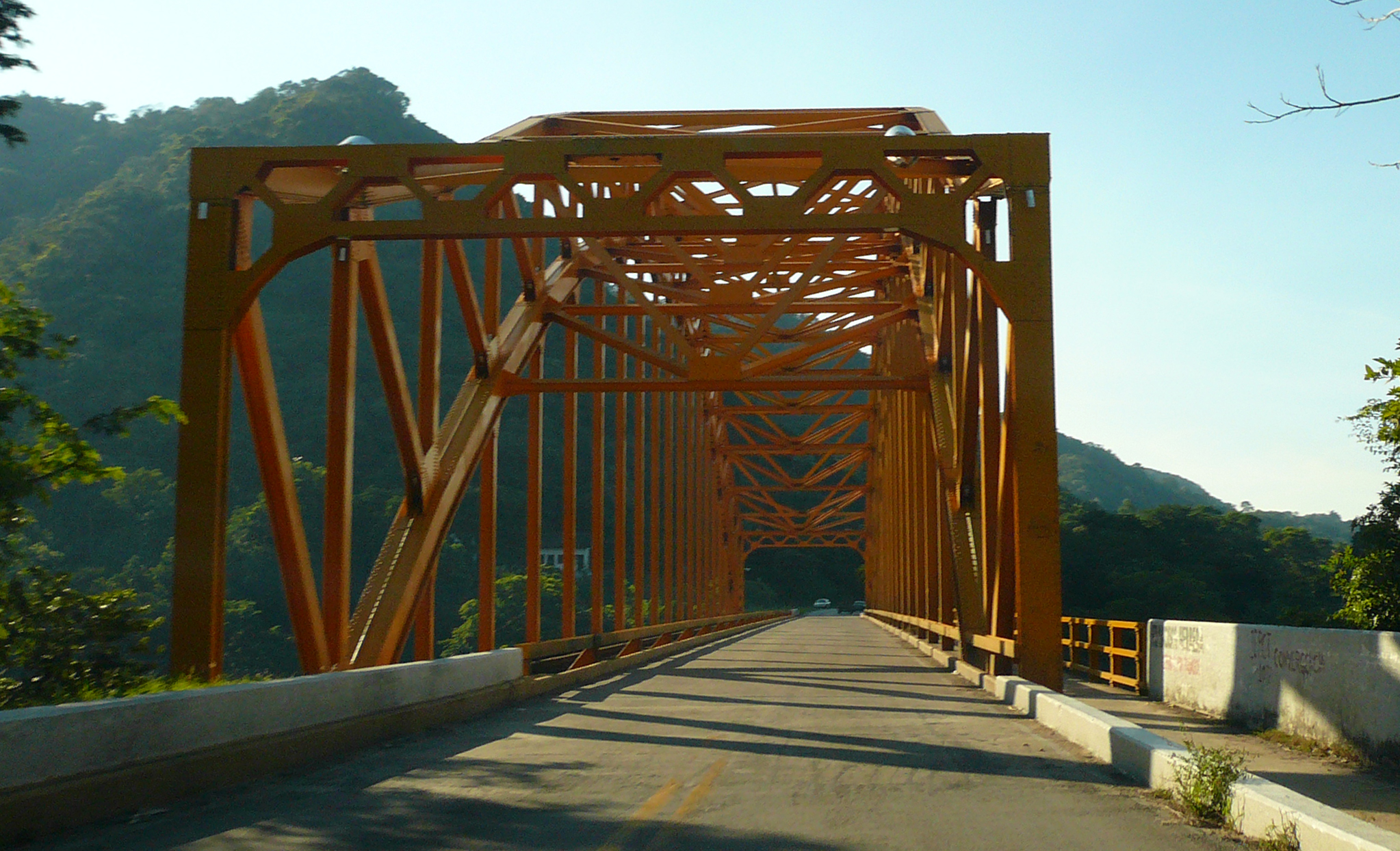 Bridge near Tenosique